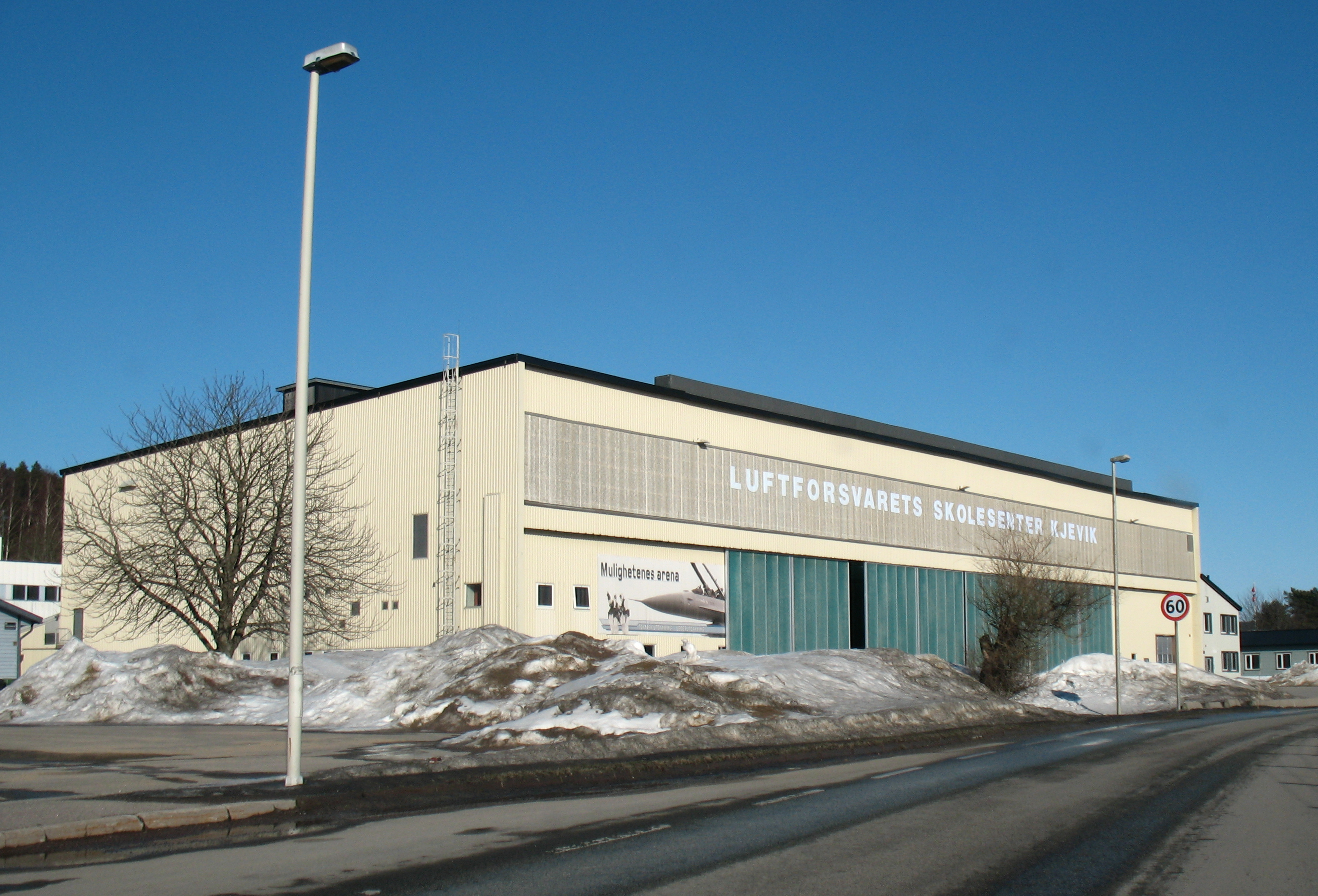 VA Luftforsvarets skolesenter Kjeviks hangar.